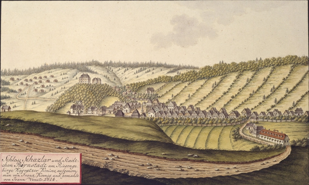 Žacléř (zámek). Schloss Schazlar und Staedtchen Börnstadt am Riesengebirge Kggraetzer Kreises, aufgenommen von Franz Koenig, und gemahlt von Joann Venuto 1814